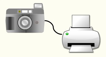 DirectPrint/直接打印